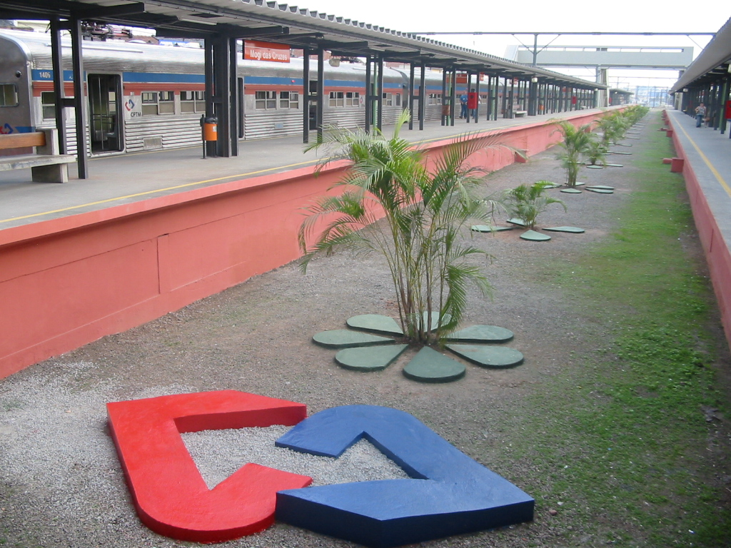 Foto da Estacao